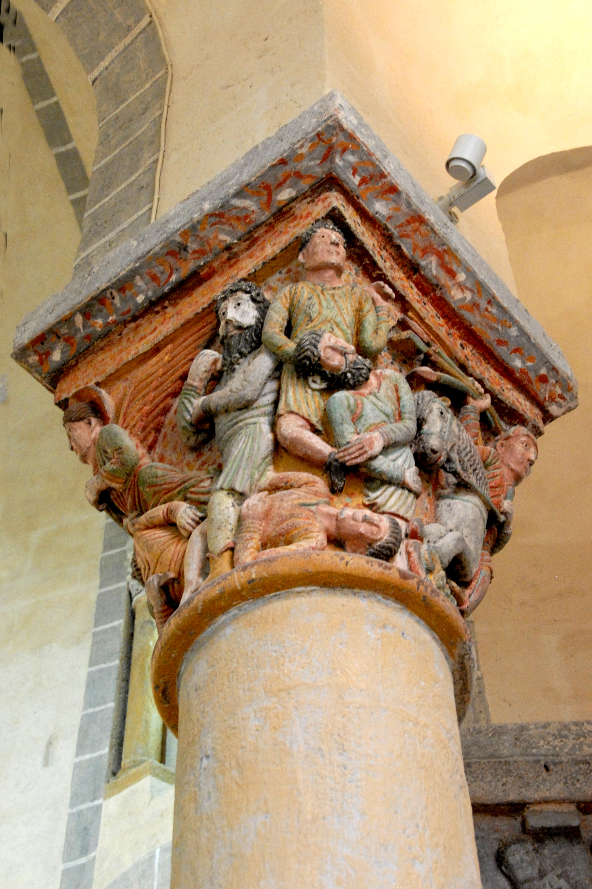 St.-Nectaire, Chorkapitell E, Seiten 18+19 Licensing Template:Benutzer:SterkeBak/commons